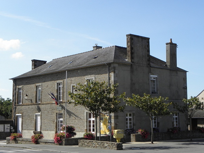 Mairie d'Épiniac (35).